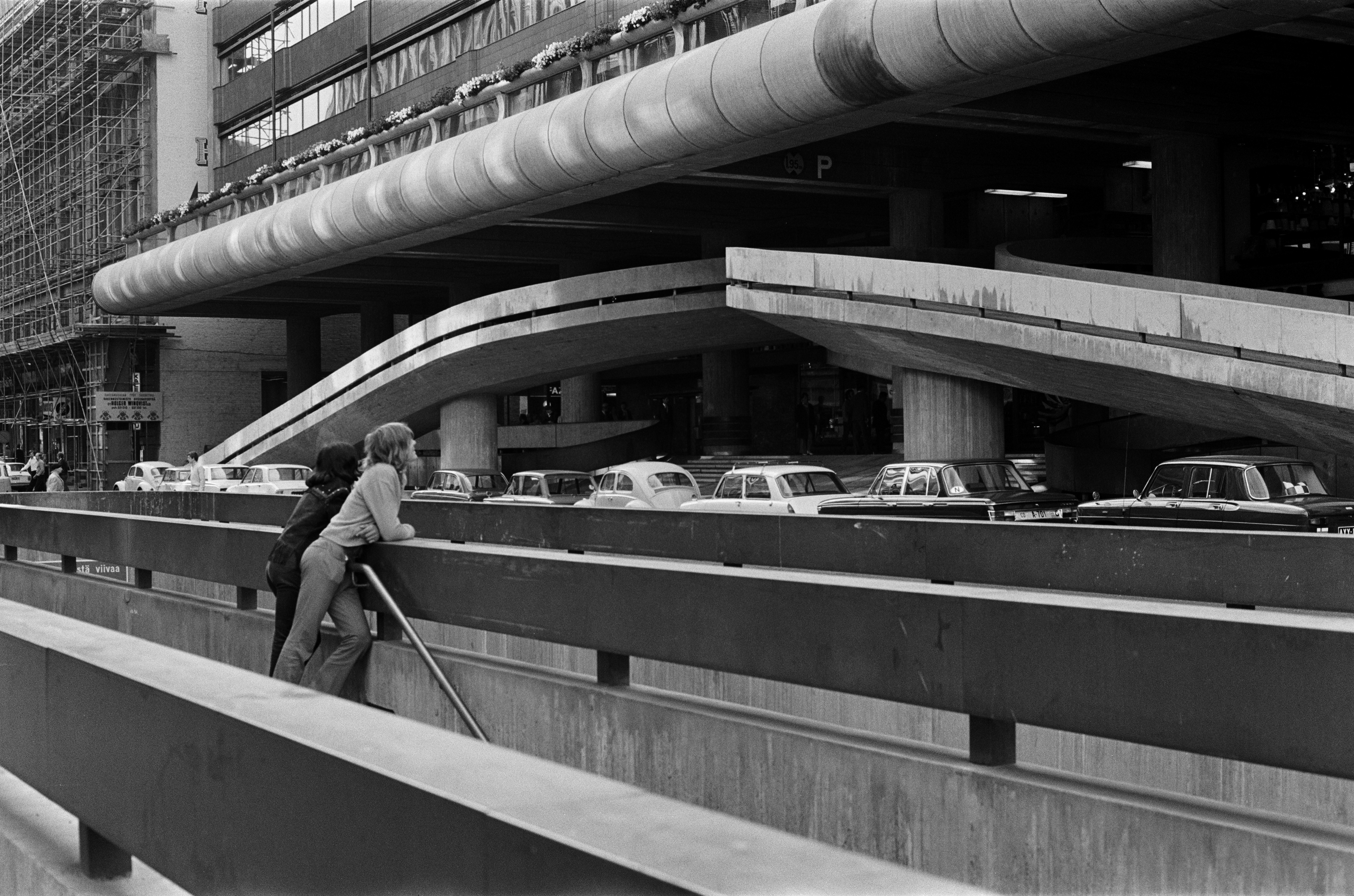 City-Center (ns. Makkaratalo) Keskuskadulta päin kuvattuna. Kaksi nuorta nojaamassa betonikaidetta vasten.